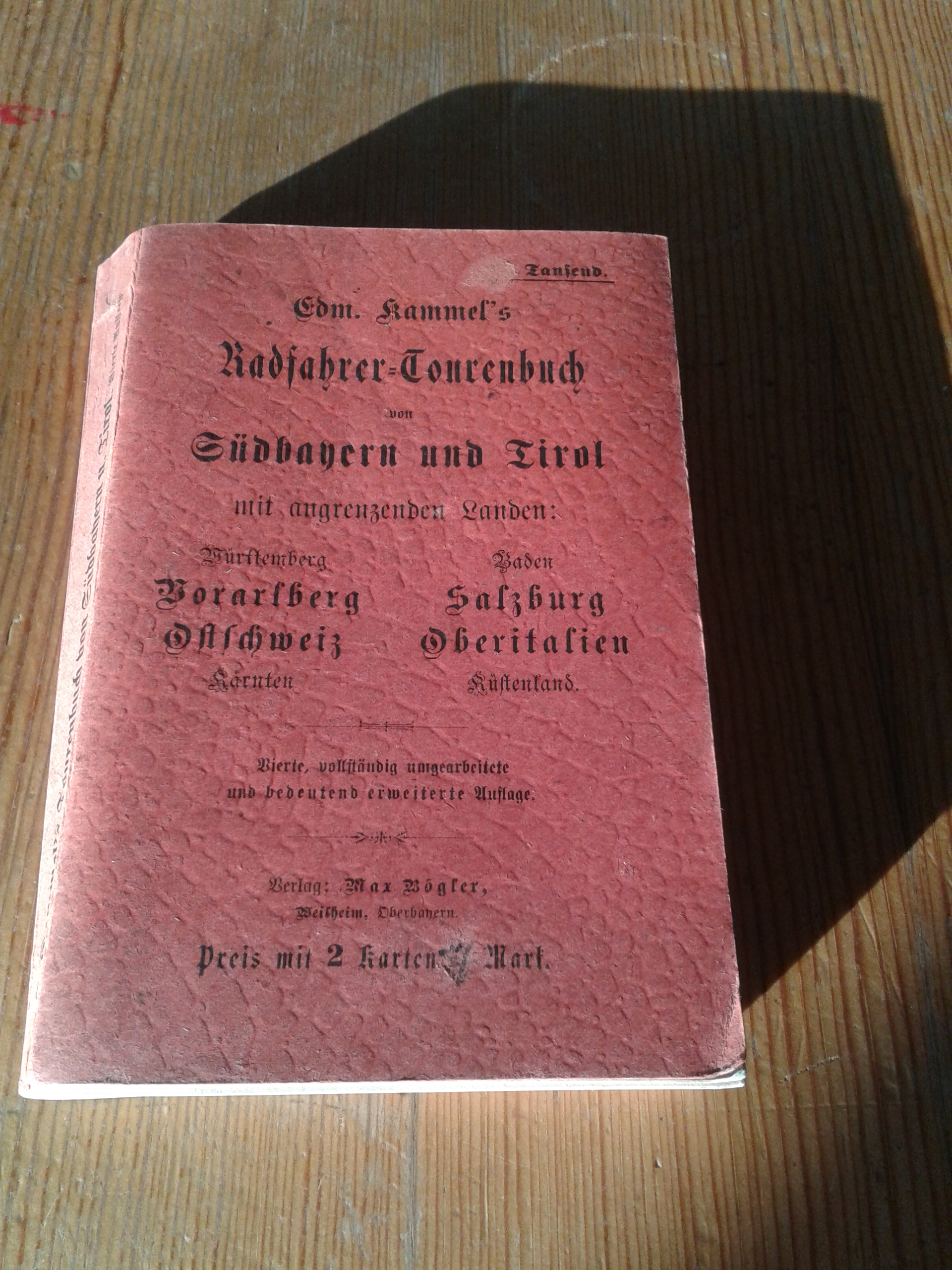 Edm. Kammel's Radfahrer-Tourenbuch von Südbayern und Tirol mit angrenzenden Landen, 4. Auflage - Weilheim : M. Bögler, (1901)